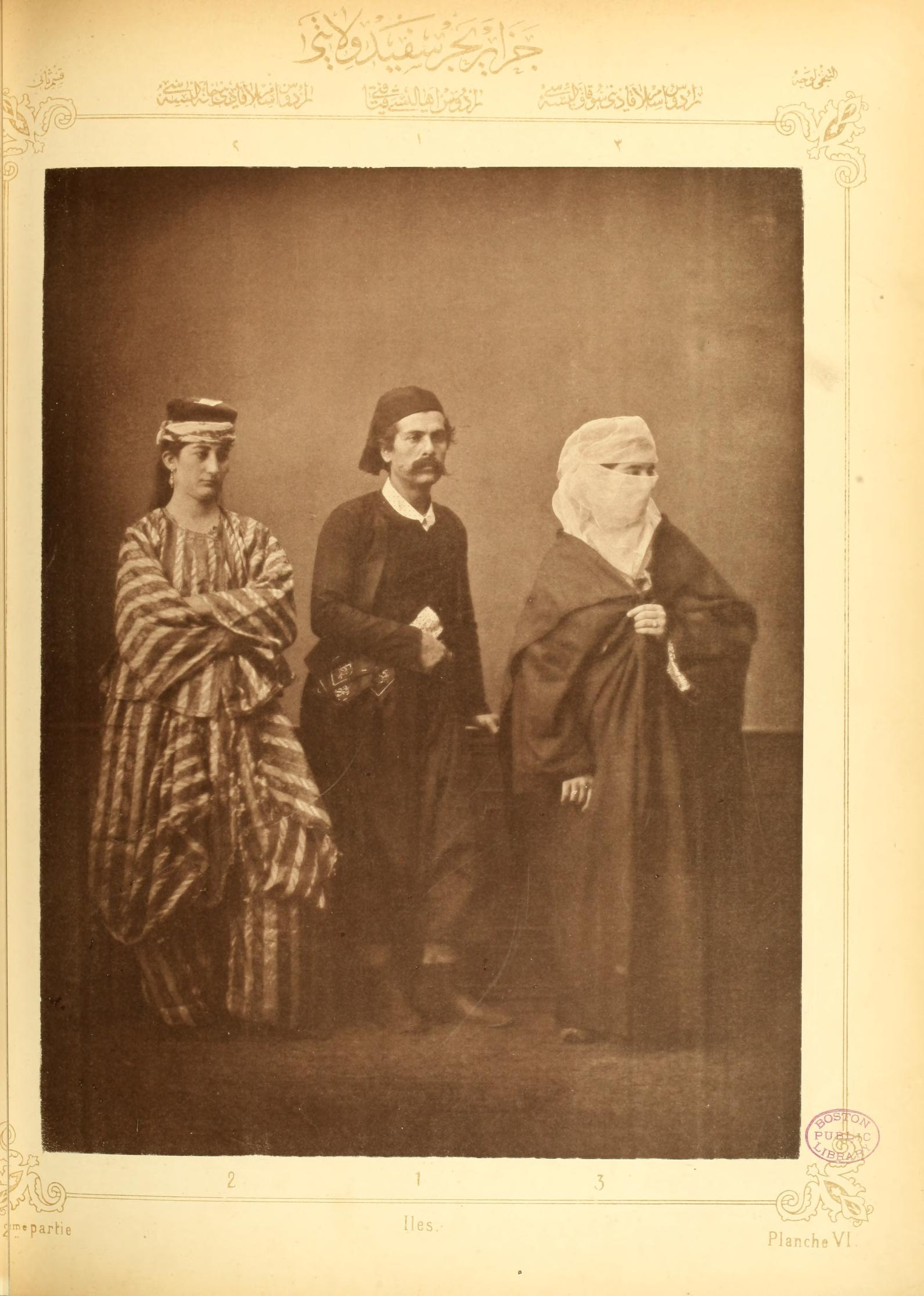 VILAYET DES ILES DE L'AKCHIPEL PLANCHE VI: Musulman de Rhodes Dame musulmane de Rhodes